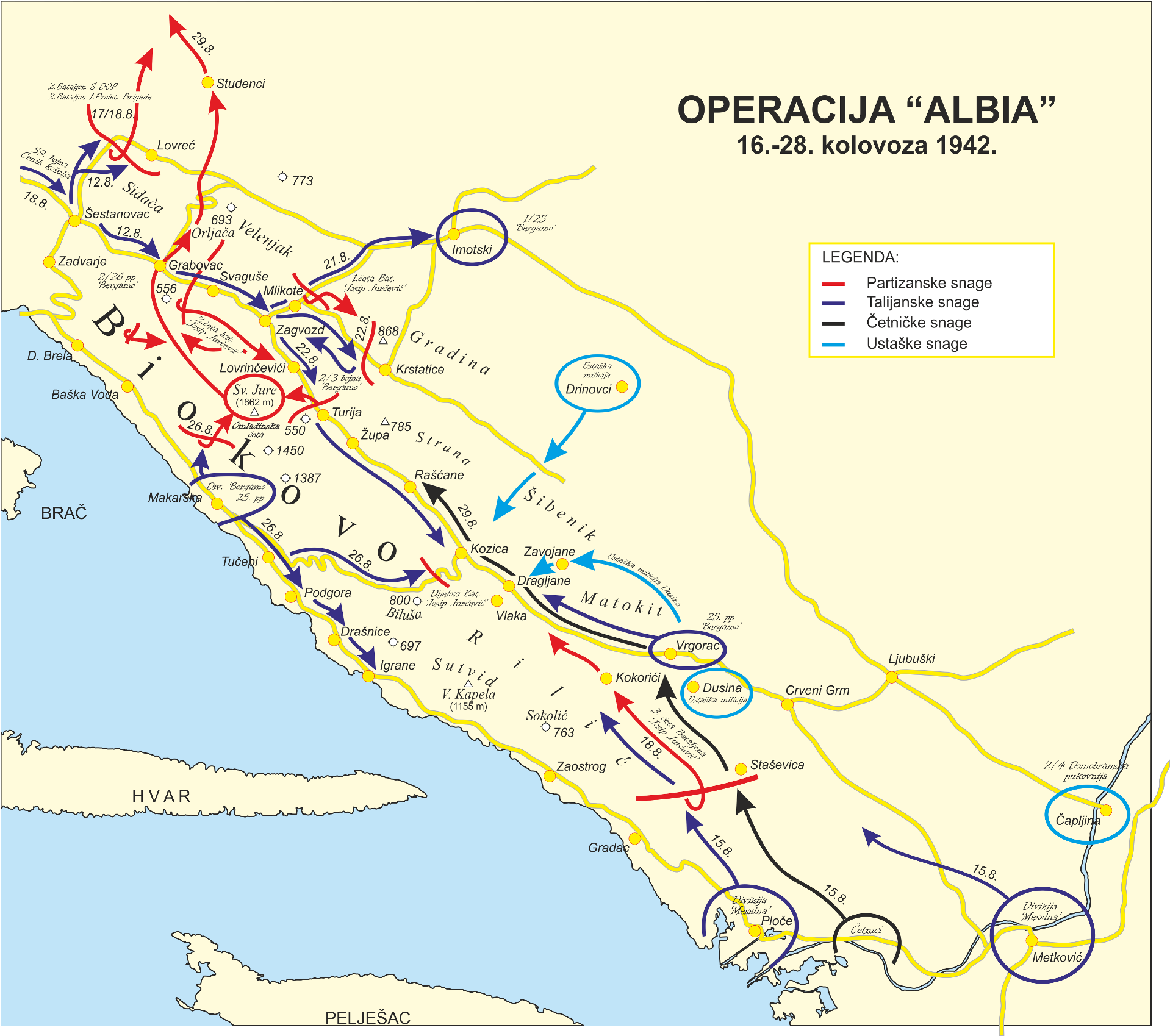 Operacija "Albia"